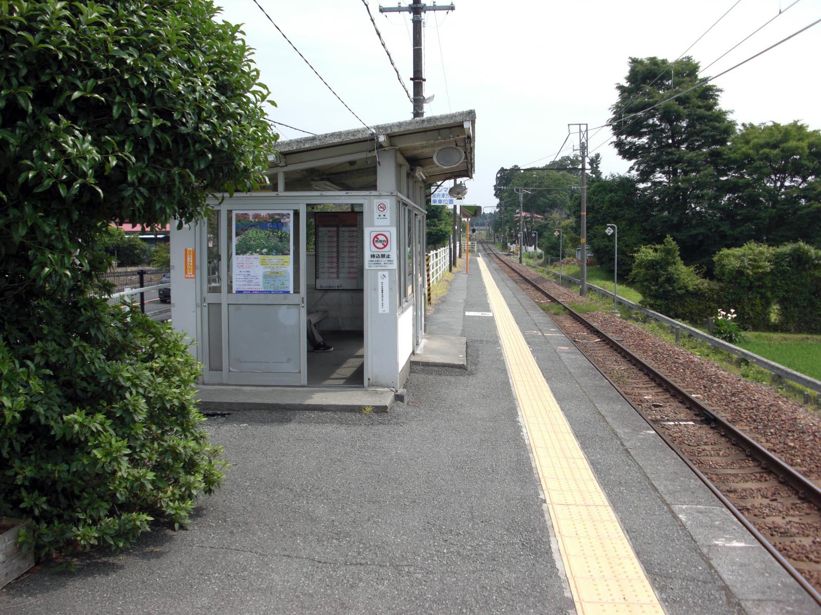 御殿場市竈、JR東海 南御殿場駅ホーム（入口付近から御殿場方面を望む）。